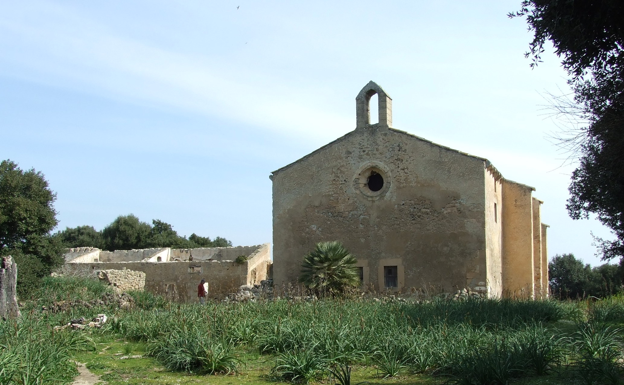 Bellpuig Priorat premostratenc (Santa Maria de Bellpuig o Santa Maria d'Artà) del mun. d'Artà